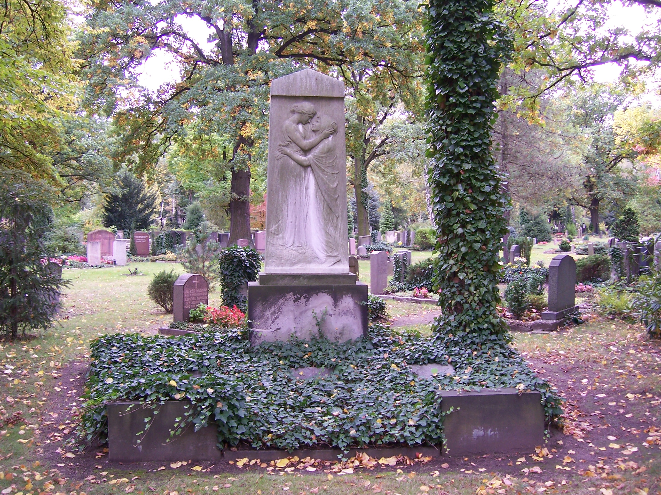 Grab des deutschen Archäologen Georg Treu auf dem Johannisfriedhof in Dresden.